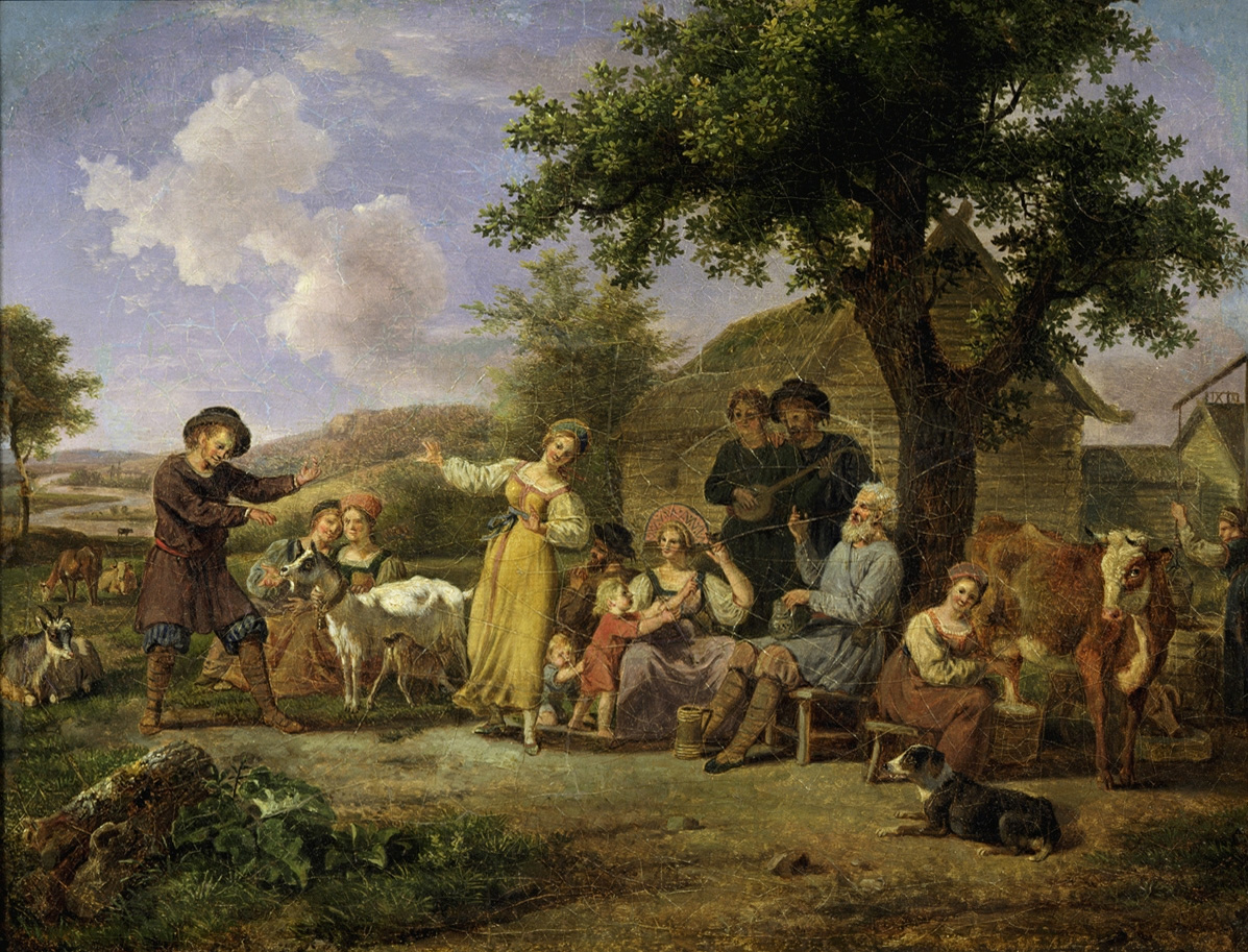 Праздник в деревне. Неизвестный художник, конец XVIII века. Холст, масло. 24,5 x 32,5. Третьяковская галерея